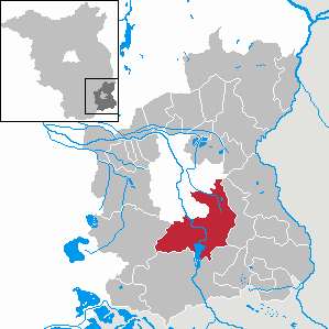 Neuhausen/Spree in Brandenburg (Country) - District Spree-Neiße